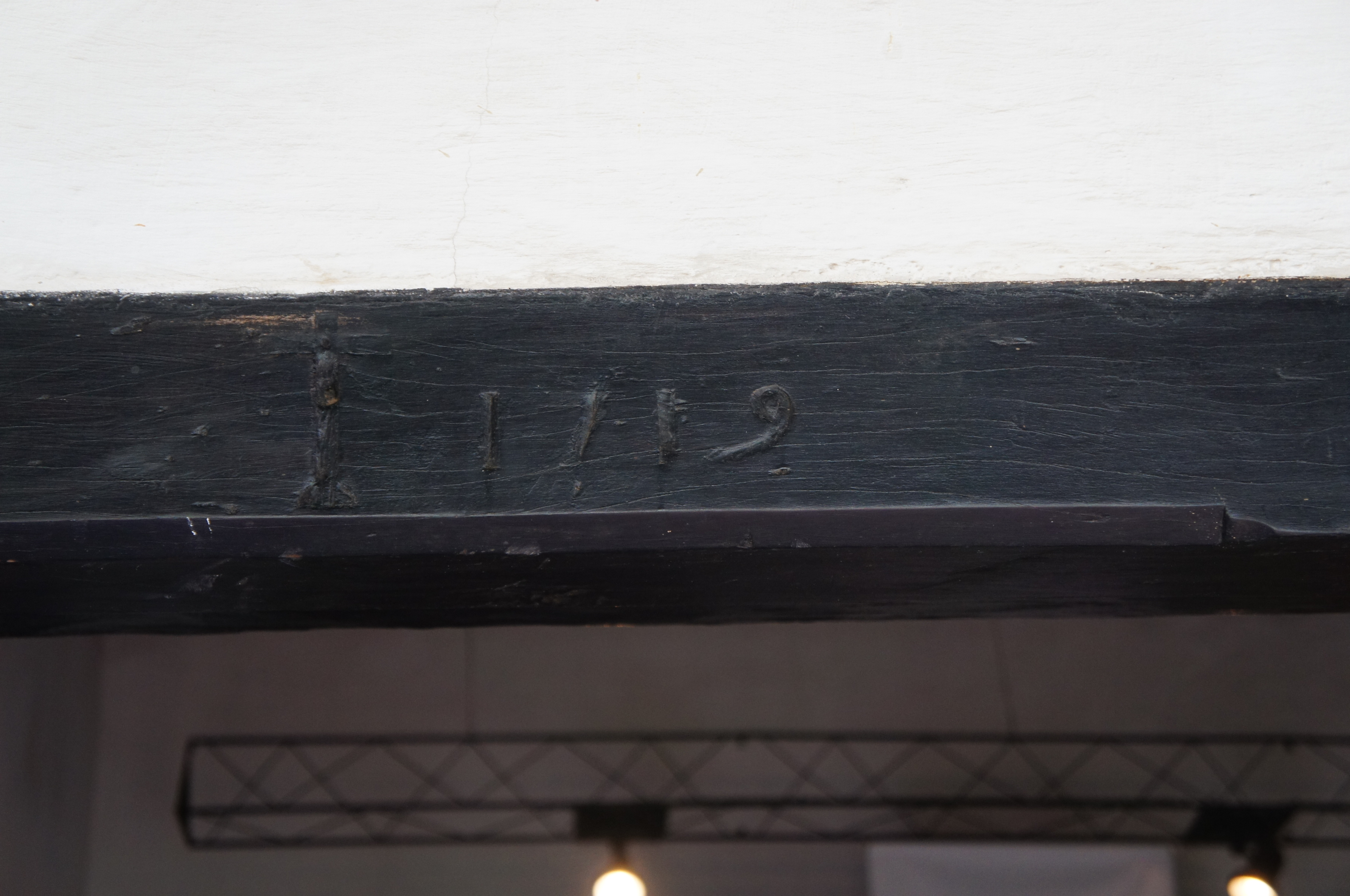 Inscrição feita na porta de entrada da Casa Sítio da Ressaca, em São Paulo (SP), Brasil; registra o ano em que a casa construída, 1719